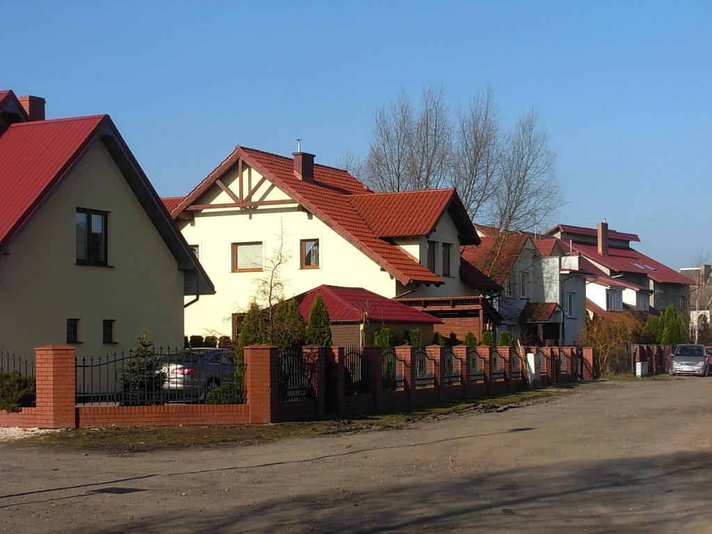 Osiedle Czyżkówko w Bydgoszczy